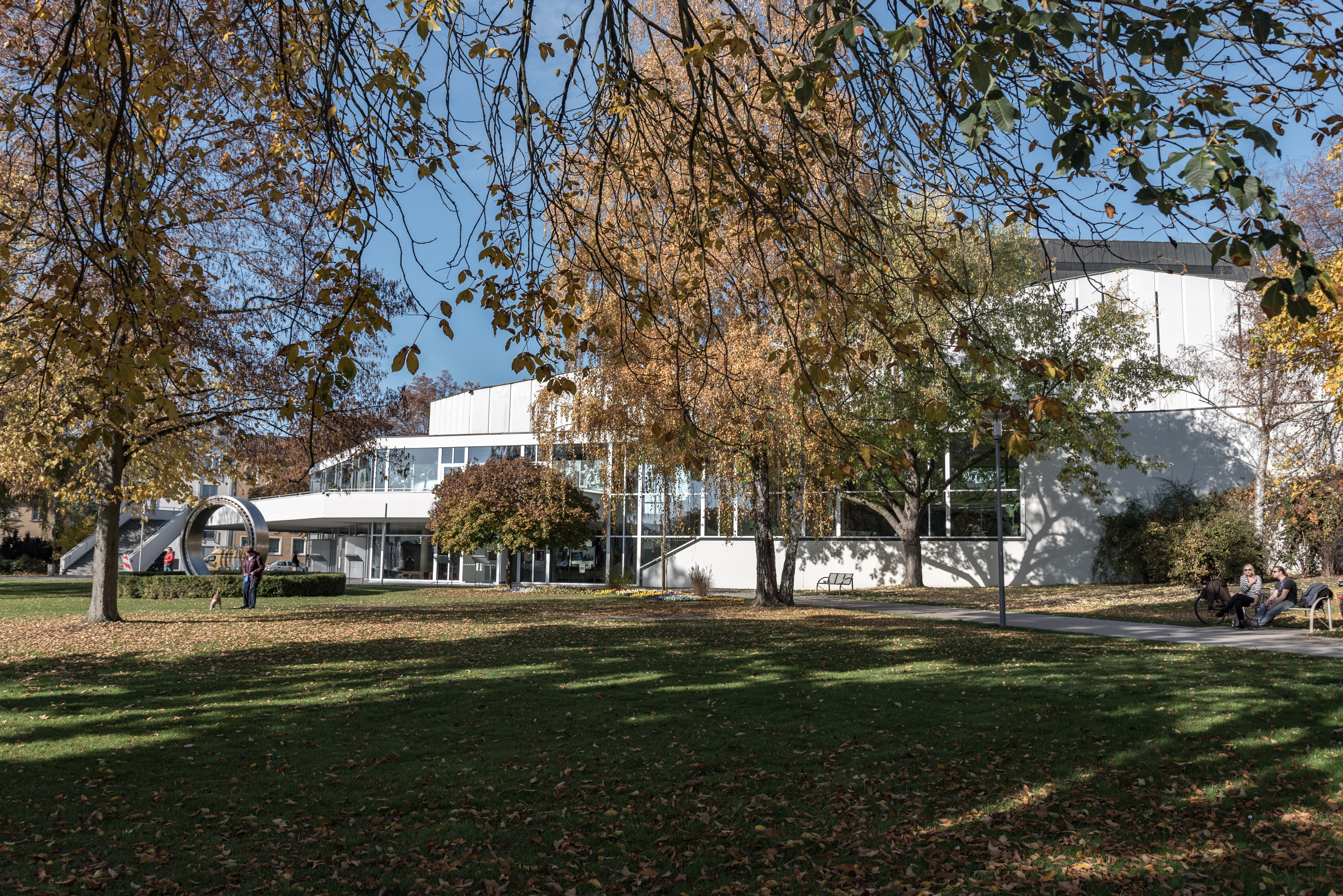 Schweinfurt, Stadttheater